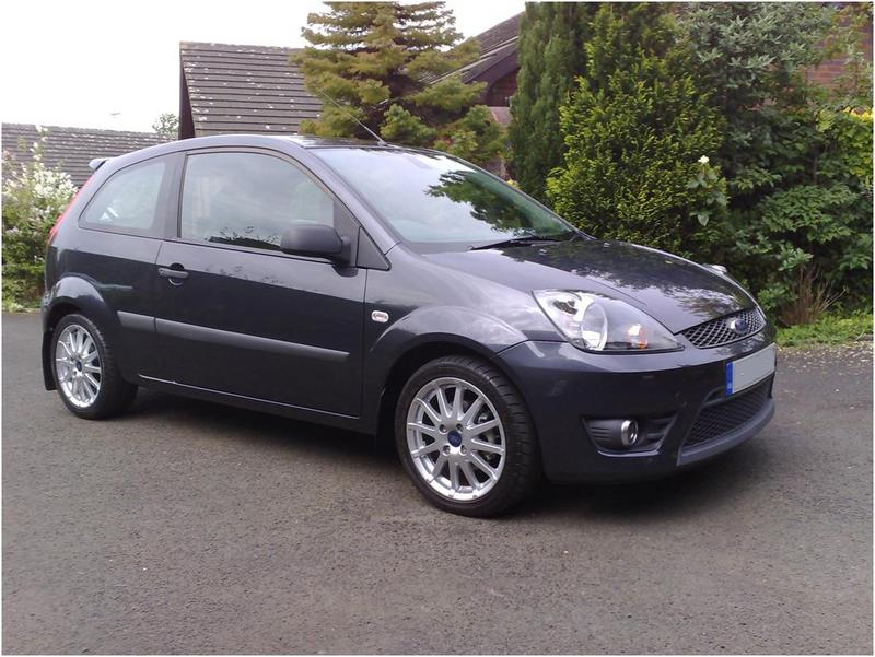 2007 Fiesta Zetec - S Mk5 facelift